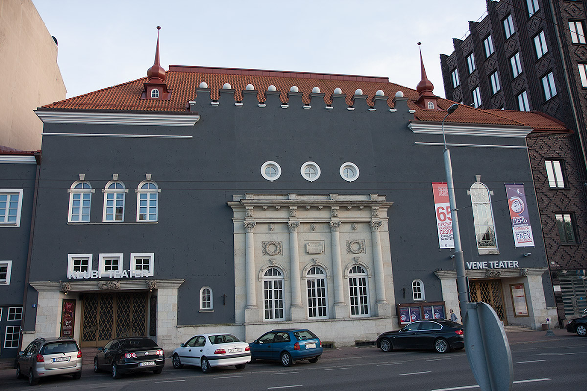 Vene Teater